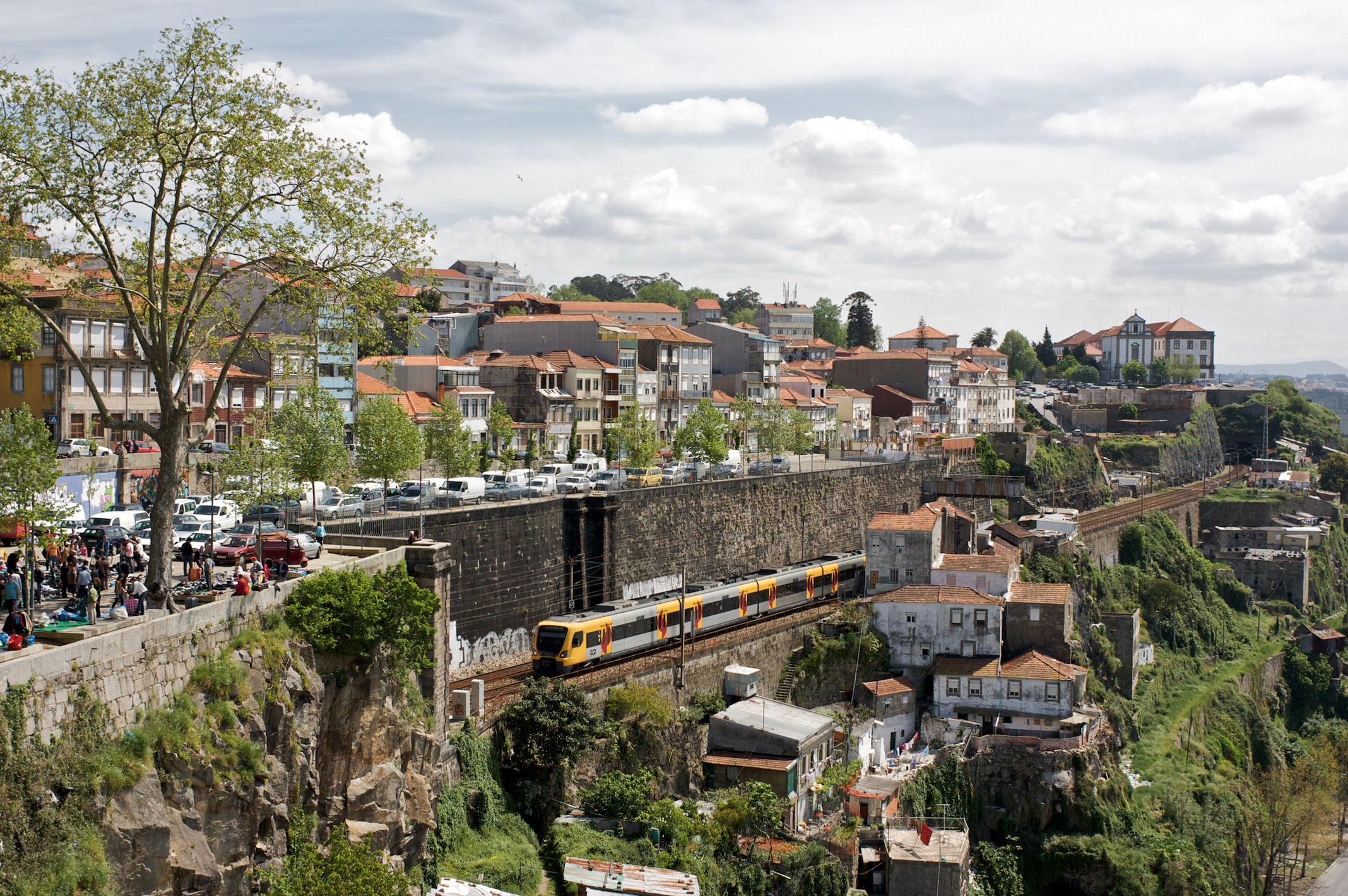 Tipo: Comboio Urbano 15518 [Caíde - Porto • São Bento] Local: Fontainhas [Linha do Minho, PK 2] Data e hora: 24 de Abril de 2010 [12h06] Material: Automotora 34xx [Unidade Múltipla Eléctrica] esta fotografia foi publicada no .